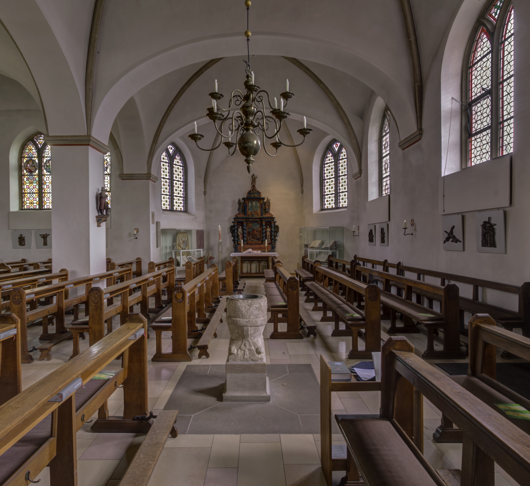 Elte St. Ludgerus - Schiff der ursprünglichen Kirche